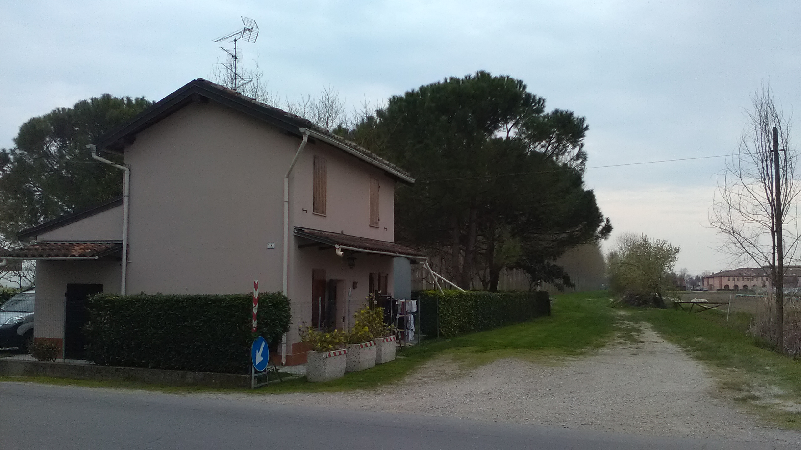 Ex stazione ferroviaria di Cavezzo-Villafranca, sulla vecchia linea Ferrovia Modena-Mirandola/Finale